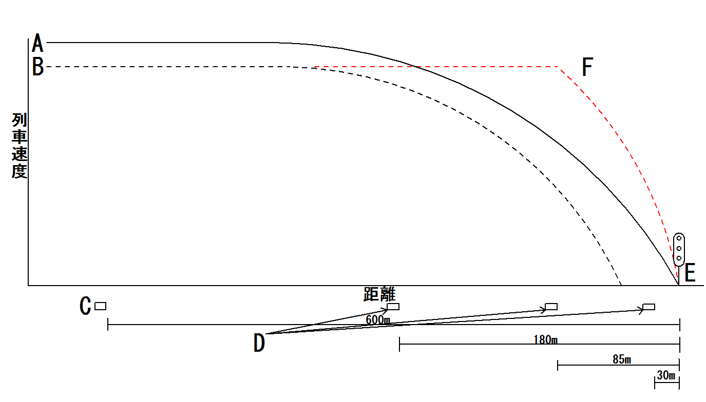 ATS-Pの照査パターンのグラフ。Aが照査パターン、Bが正常な運転のパターン、Cがパターン発生用地上子、Dが更新用地上子、Fが信号機、赤の破線は間違った運転でのATSによるブレーキが掛かったパターン。